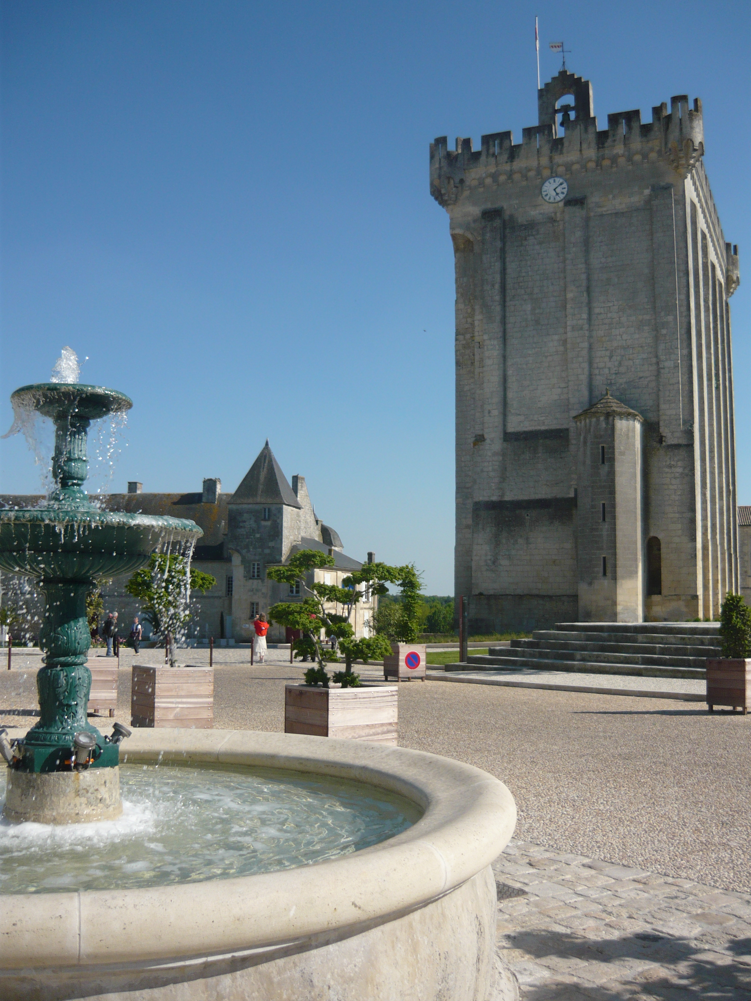 la fontaine et le donjon à Pons (17)